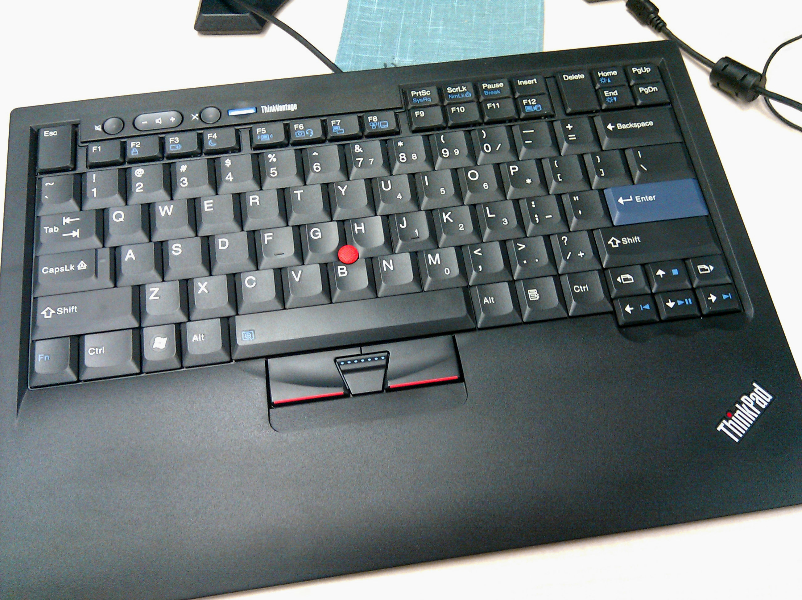 たわむな〜